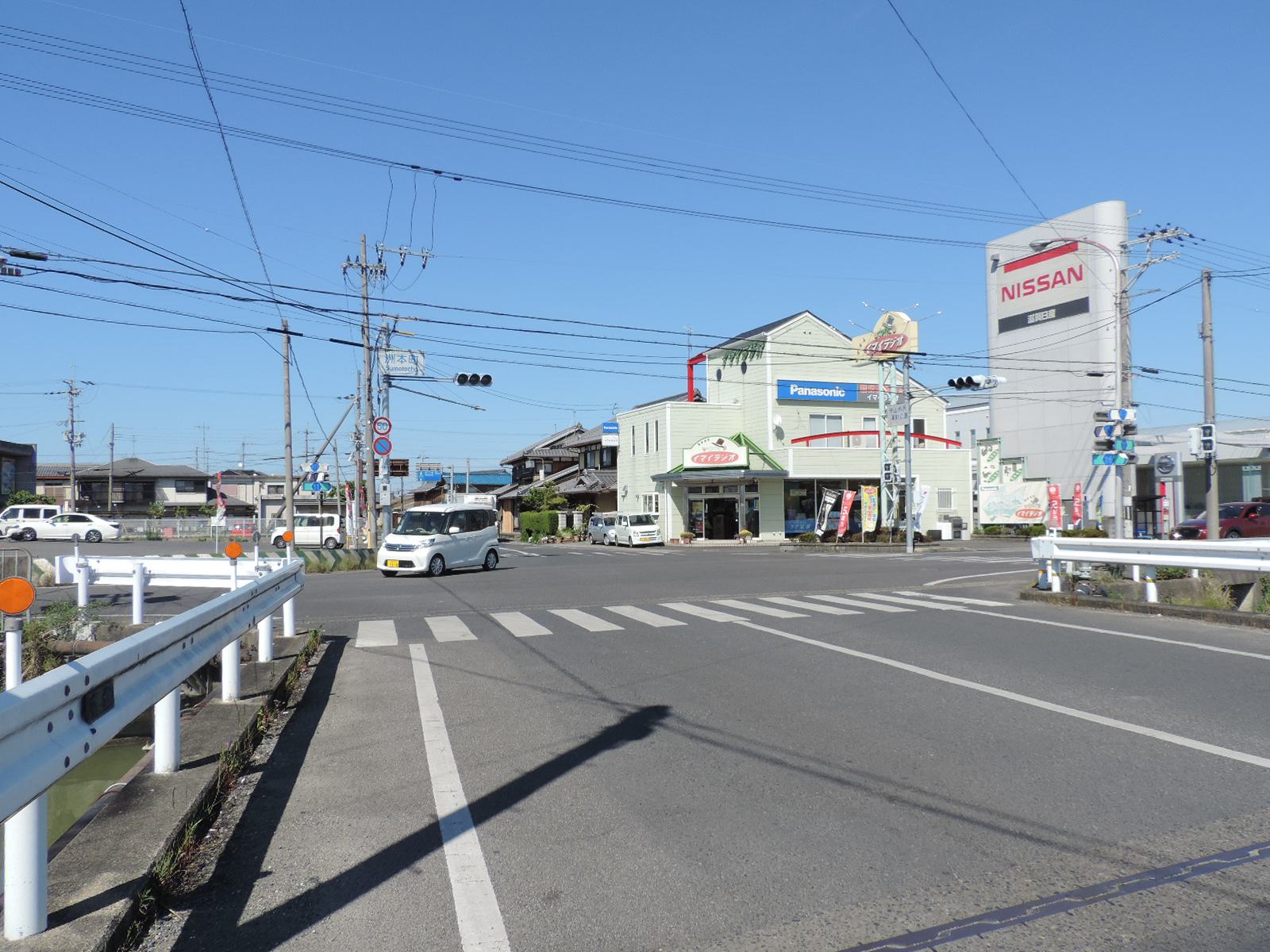 滋賀県守山市の洲本交差点。国道477号・滋賀県道11号守山栗東線・滋賀県道26号大津守山近江八幡線の交差点。